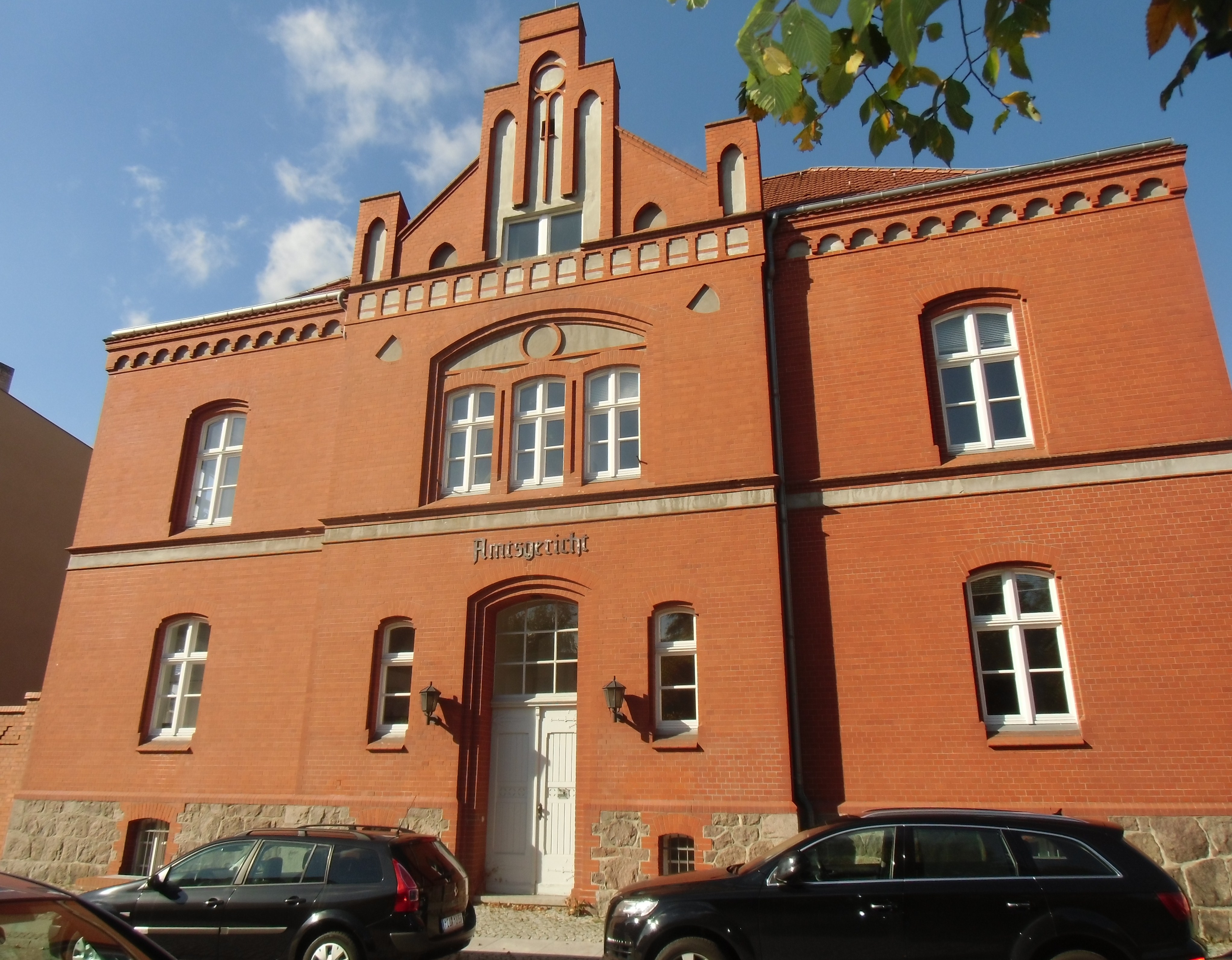 Backsteinbau in Klosterstraße 13 im historischen Stadtkern von Strausberg, errichtet im 19. Jahrhundert von Otto Bertschi